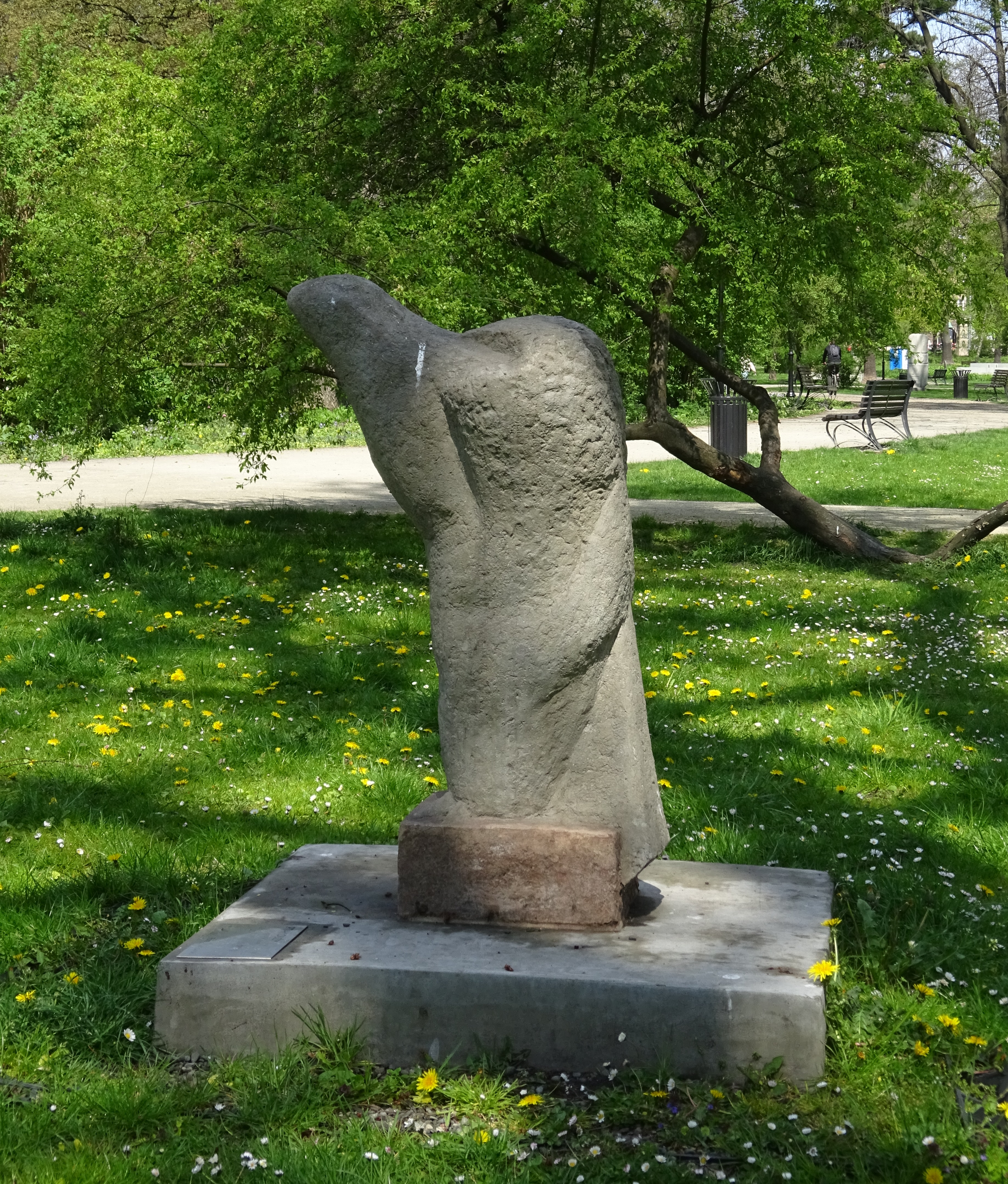 Rzeźba „Ptak Duży”, autorstwa Romana Tarkowskiego z II połowy XX wieku, znajdująca się w Parku Krakowskim w Krakowie.